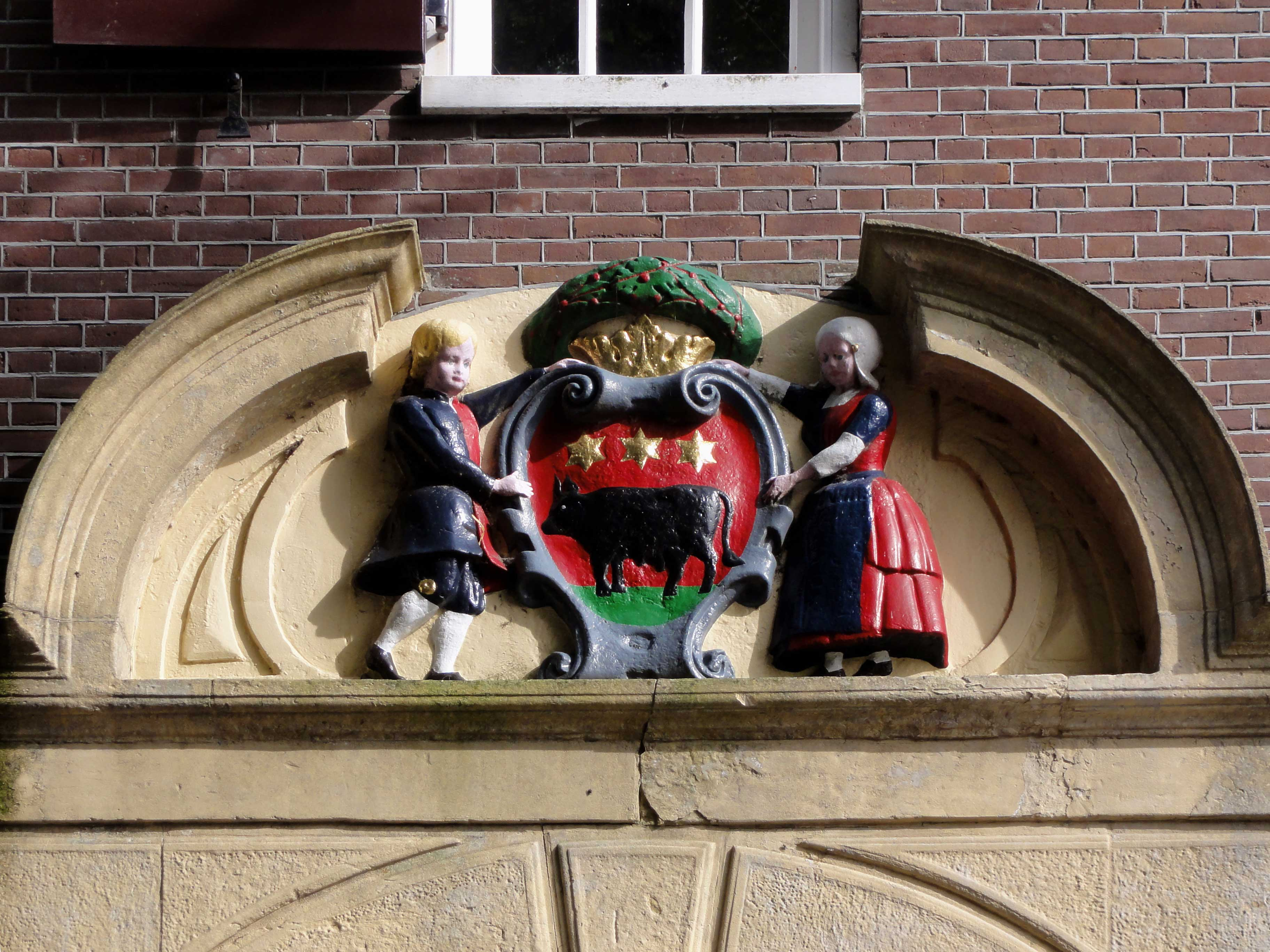 Weeskinderen met wapen Jan Nieuwenhuizenplein 12-14 Edam